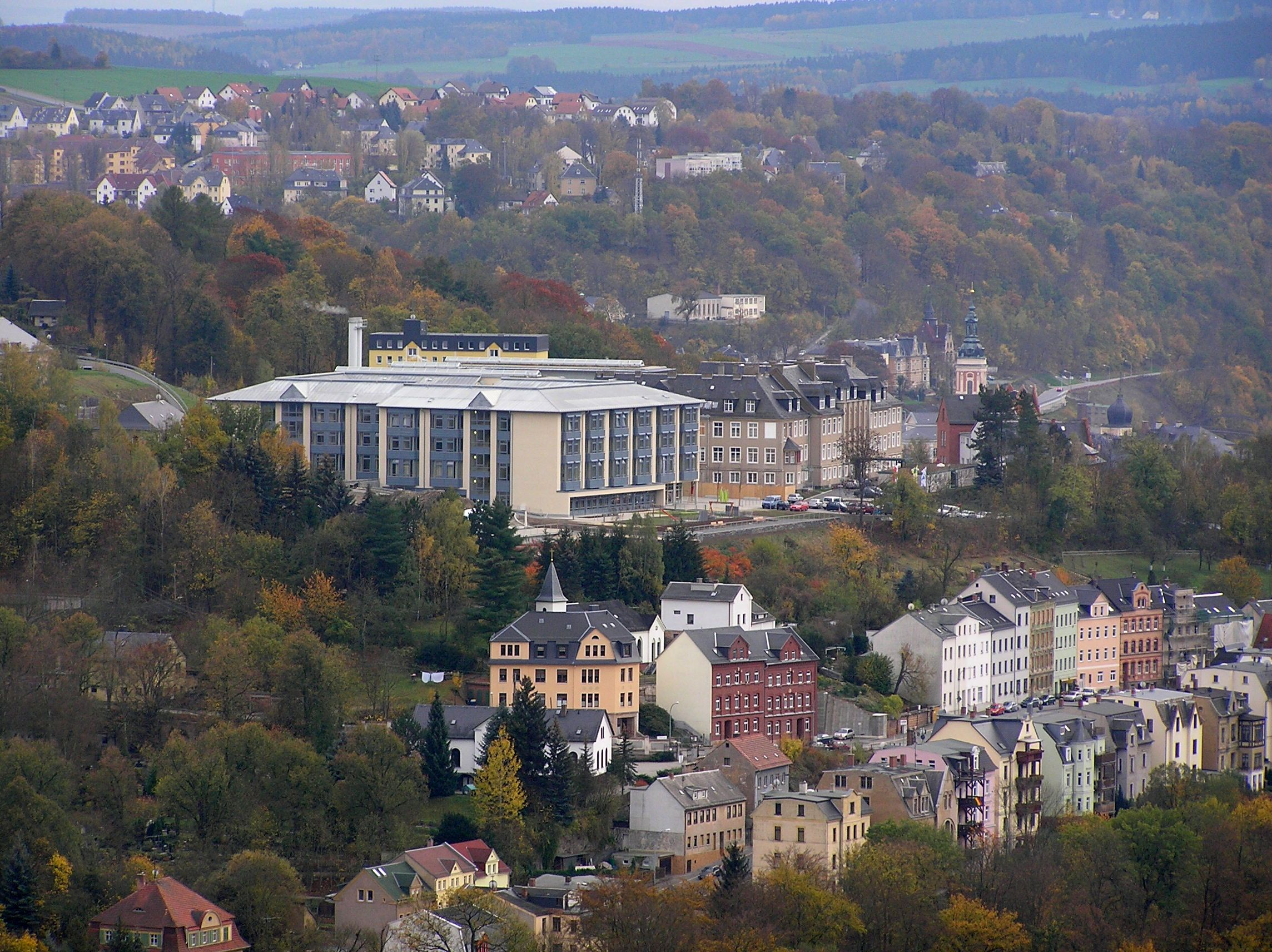 Blick vom "Weißen Kreuz" in Richtung KKH Klinikum Greiz, Deutschland